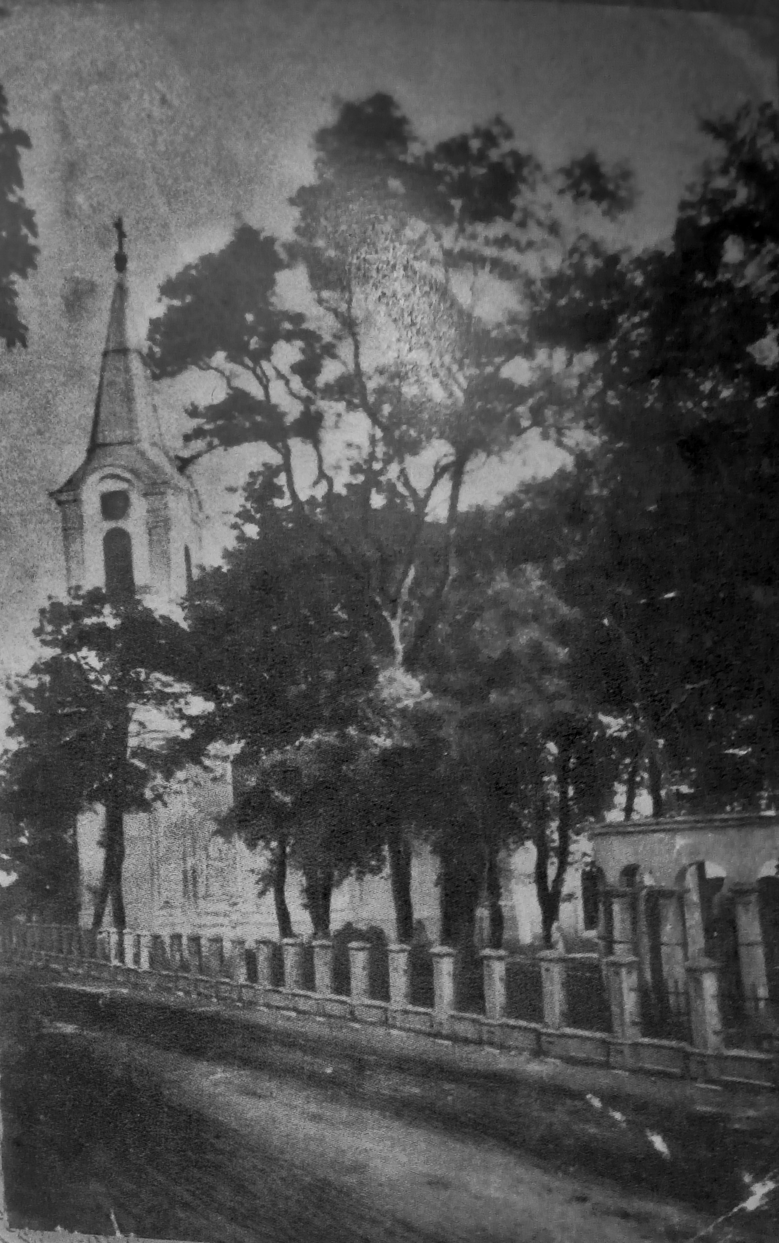 Bodajki Segítő Szűz Mária templom 1930-ban (digitalizált, utómunkával)